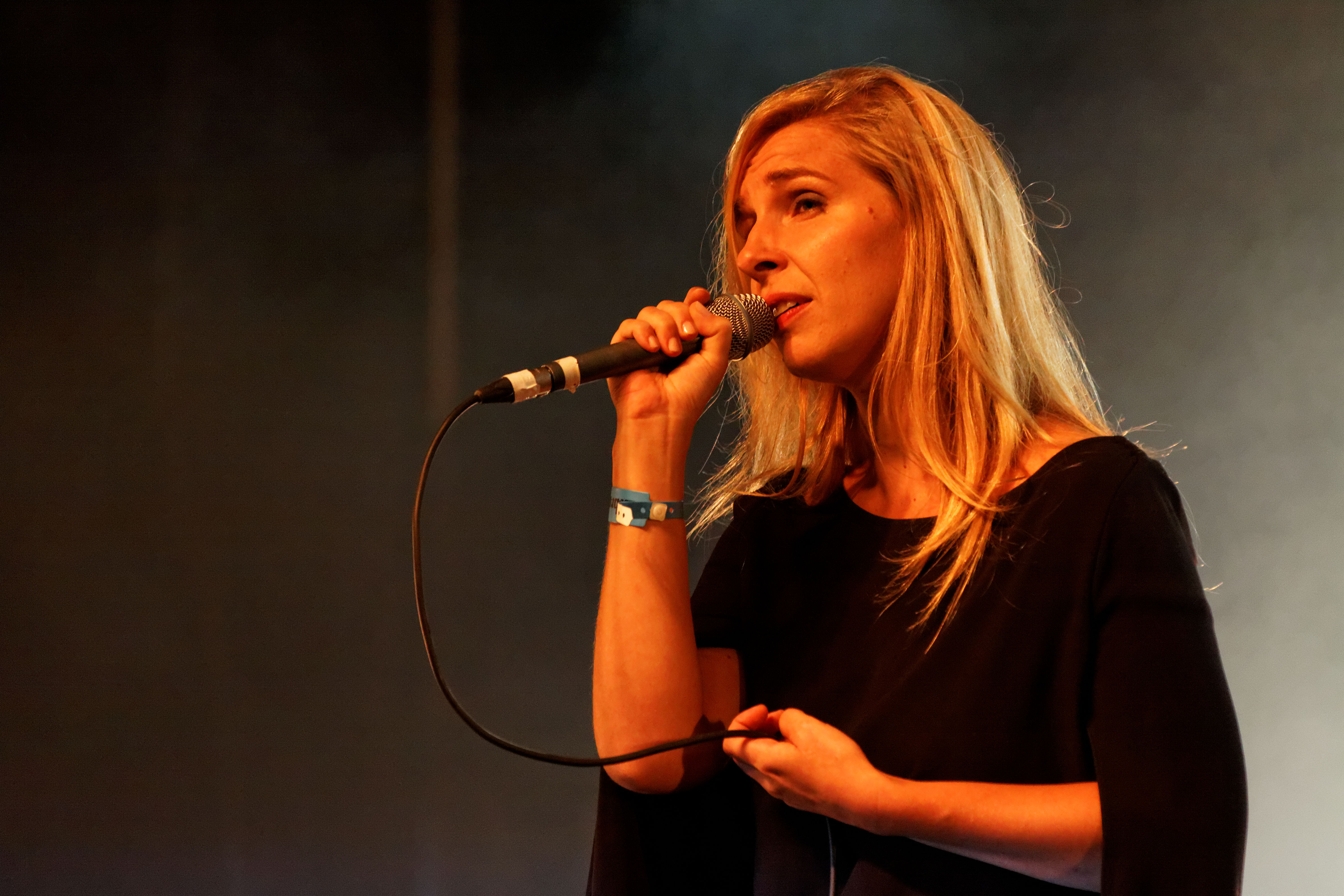 Barbara Carlotti en concert sur la scène Zebrock lors de la fête de l'Humanité 2012.